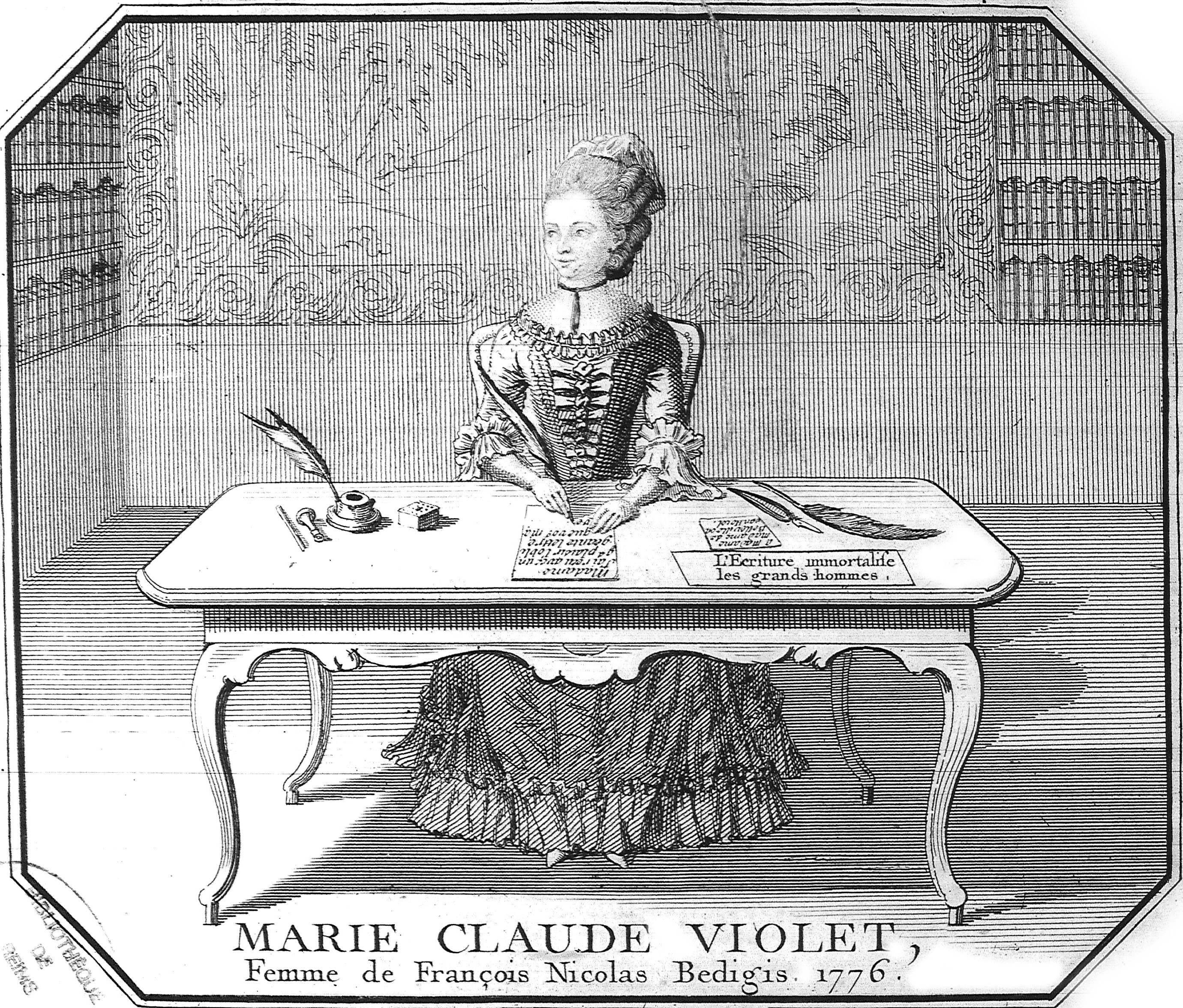 image de la bibliothèque de reims.